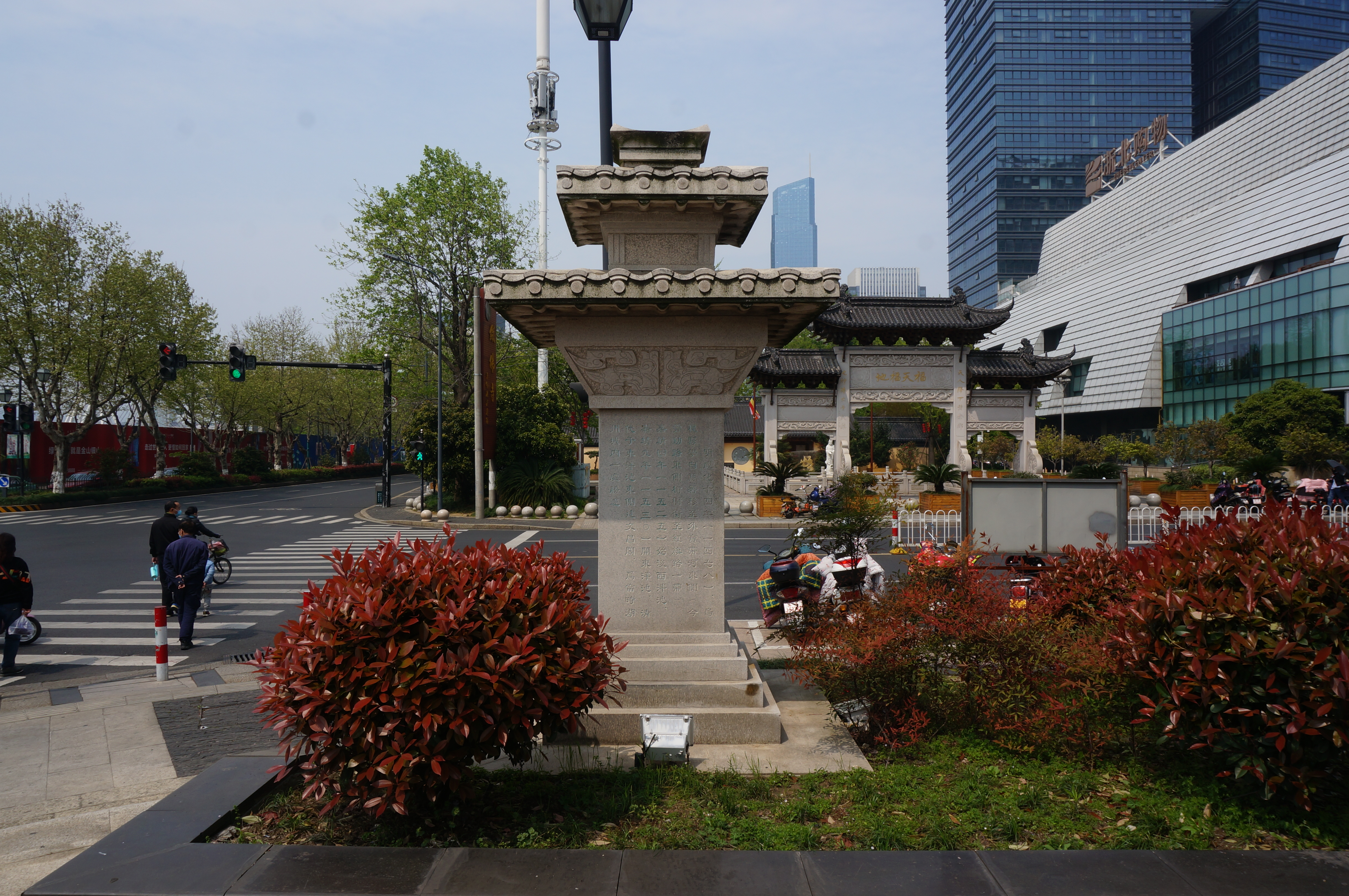 乌程县学旧址碑，南面。